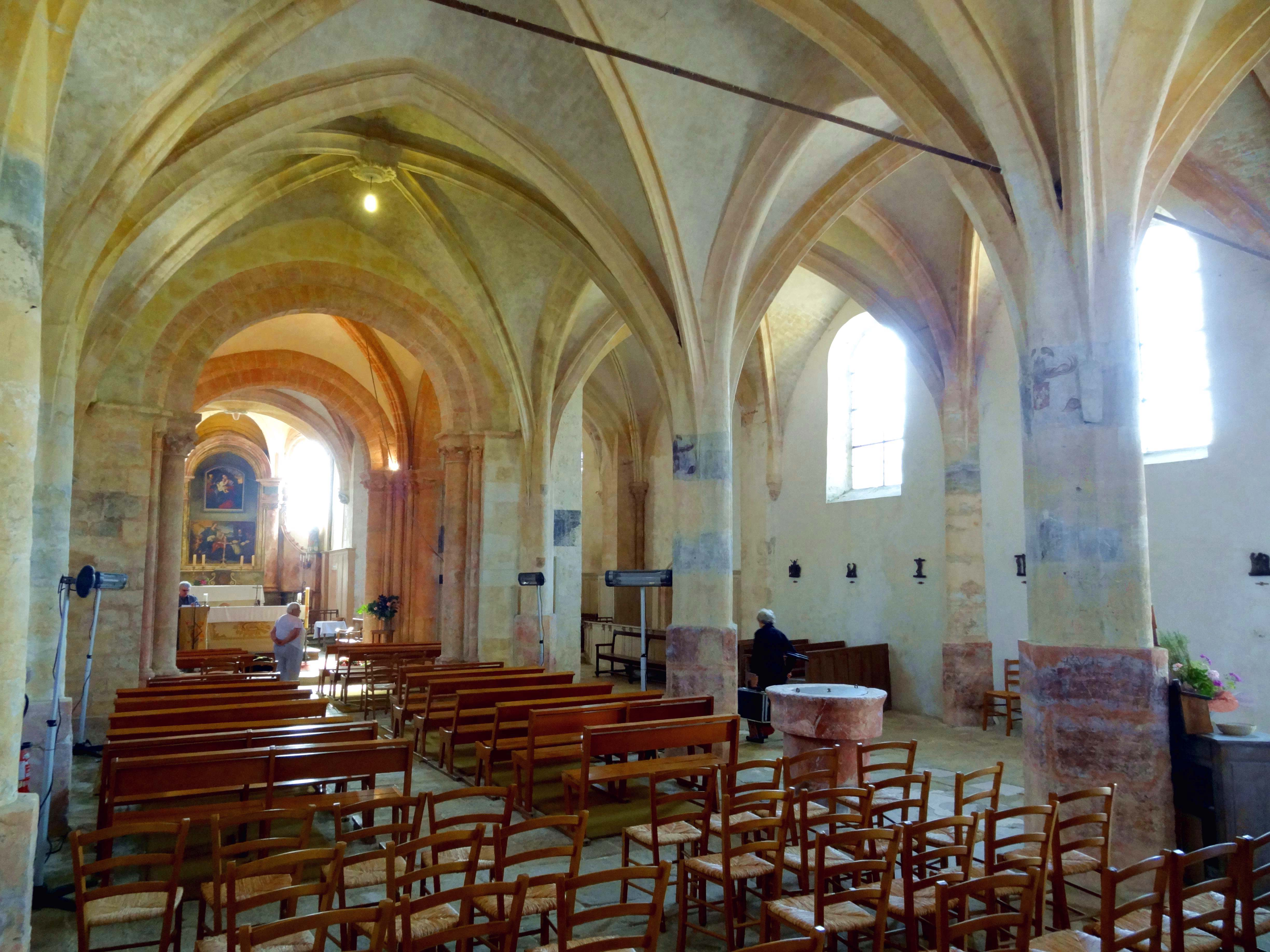 Intérieur de l'église - voir titre.